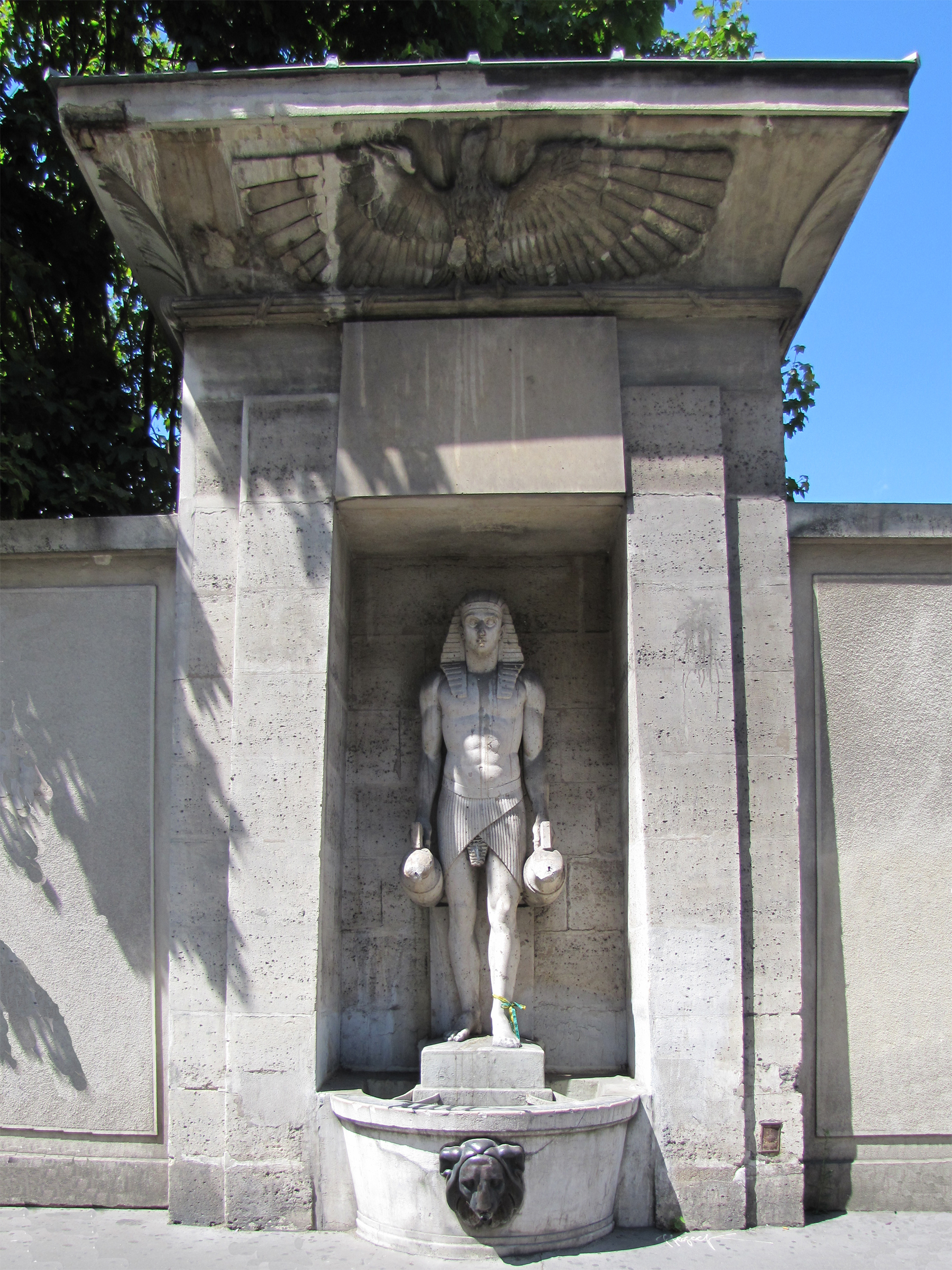 Fontaine du fellah, 42 rue de Sèvres, Paris 7